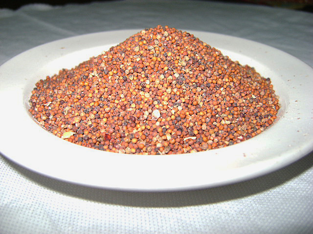 L' éleusine à des petits grains d'environ 2mm, elle a une forme ovoïde et une couleur orange. Elle sert comme une malt à la fabrication des bières traditionnelles. This is an image of food from Burundi